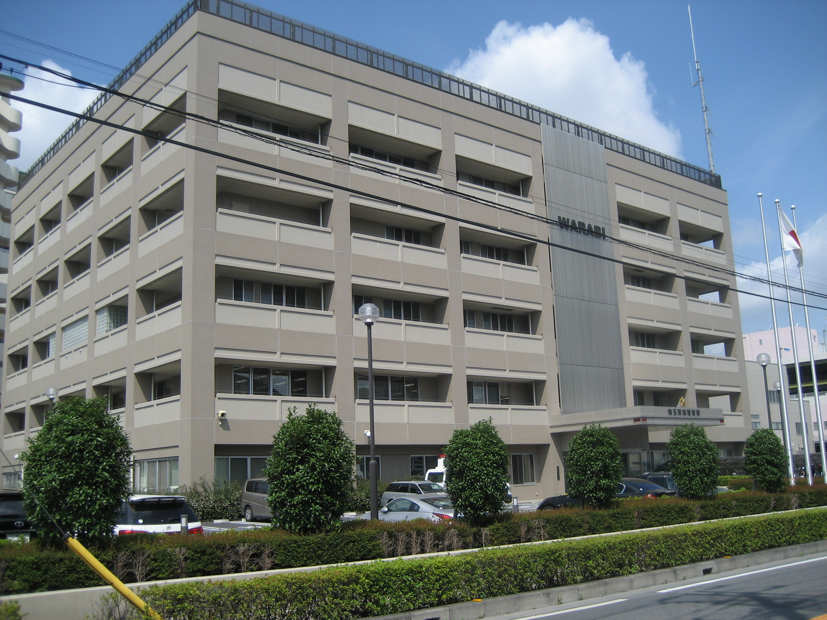 埼玉県蕨警察署庁舎